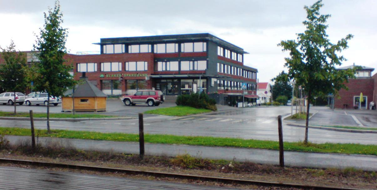 Blaker sparebank på Sørumsand.